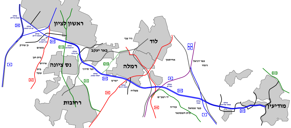 תרשים הכביש ונקודות מרכזיות בהן הוא עובר בסמוך ומספרי הכבישים